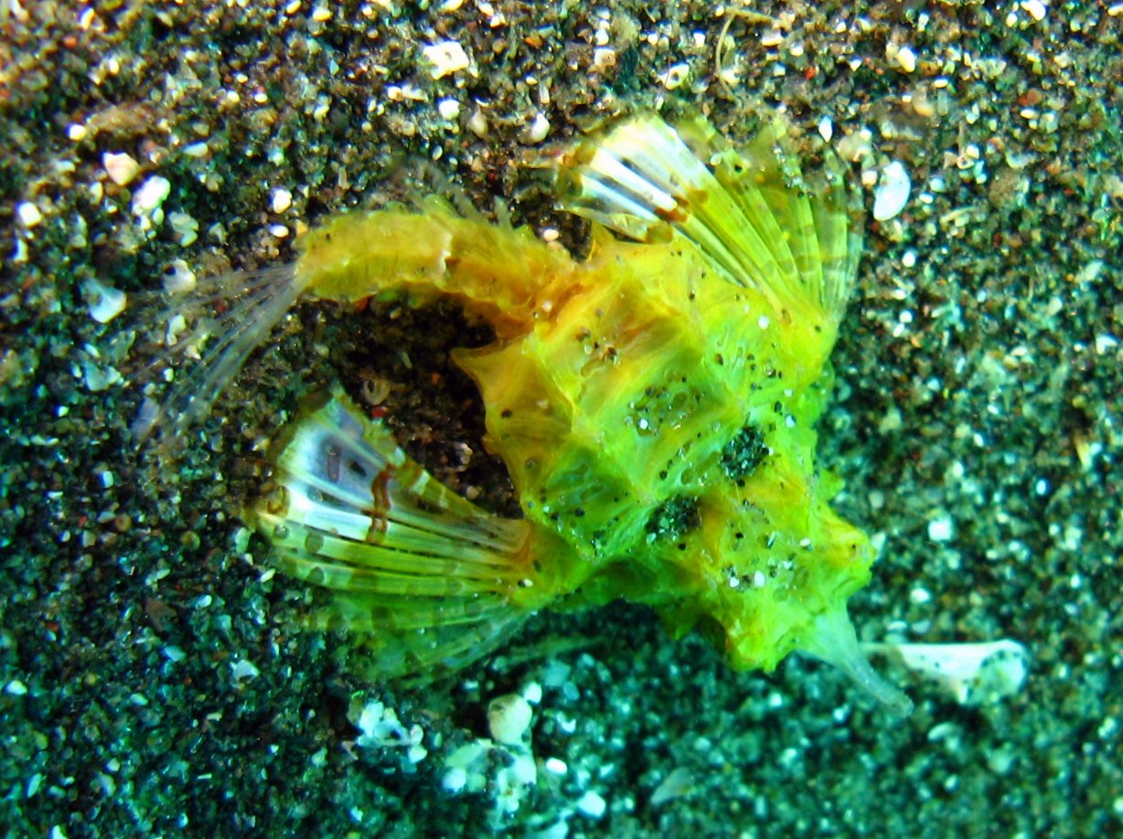 Pegasus laternarius, Indonesia July 2007